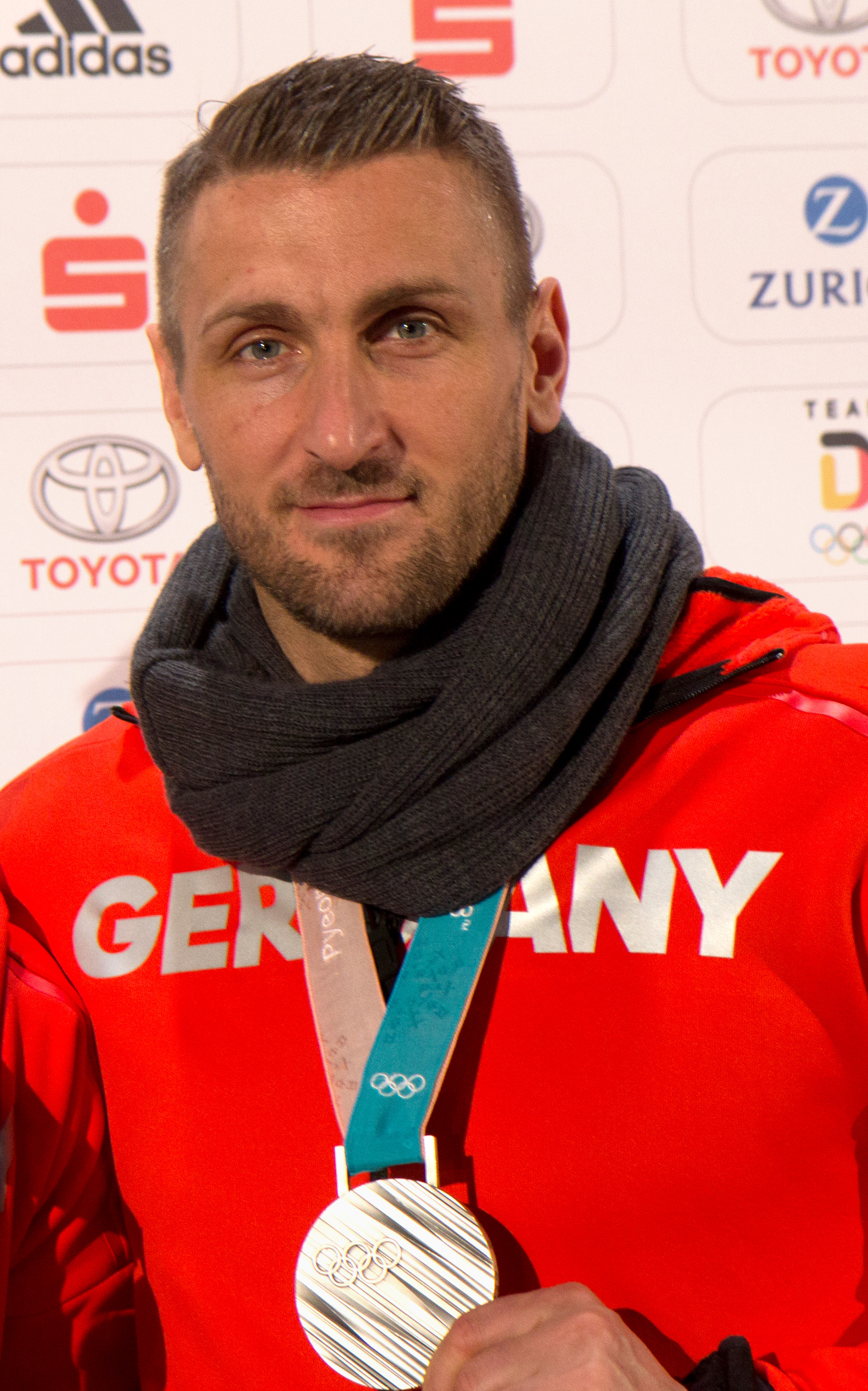 Ankunft der deutschen Olympiamannschaft am 26. Februar 2018 mit Flug LH713 auf dem Frankfurter Flughafen.